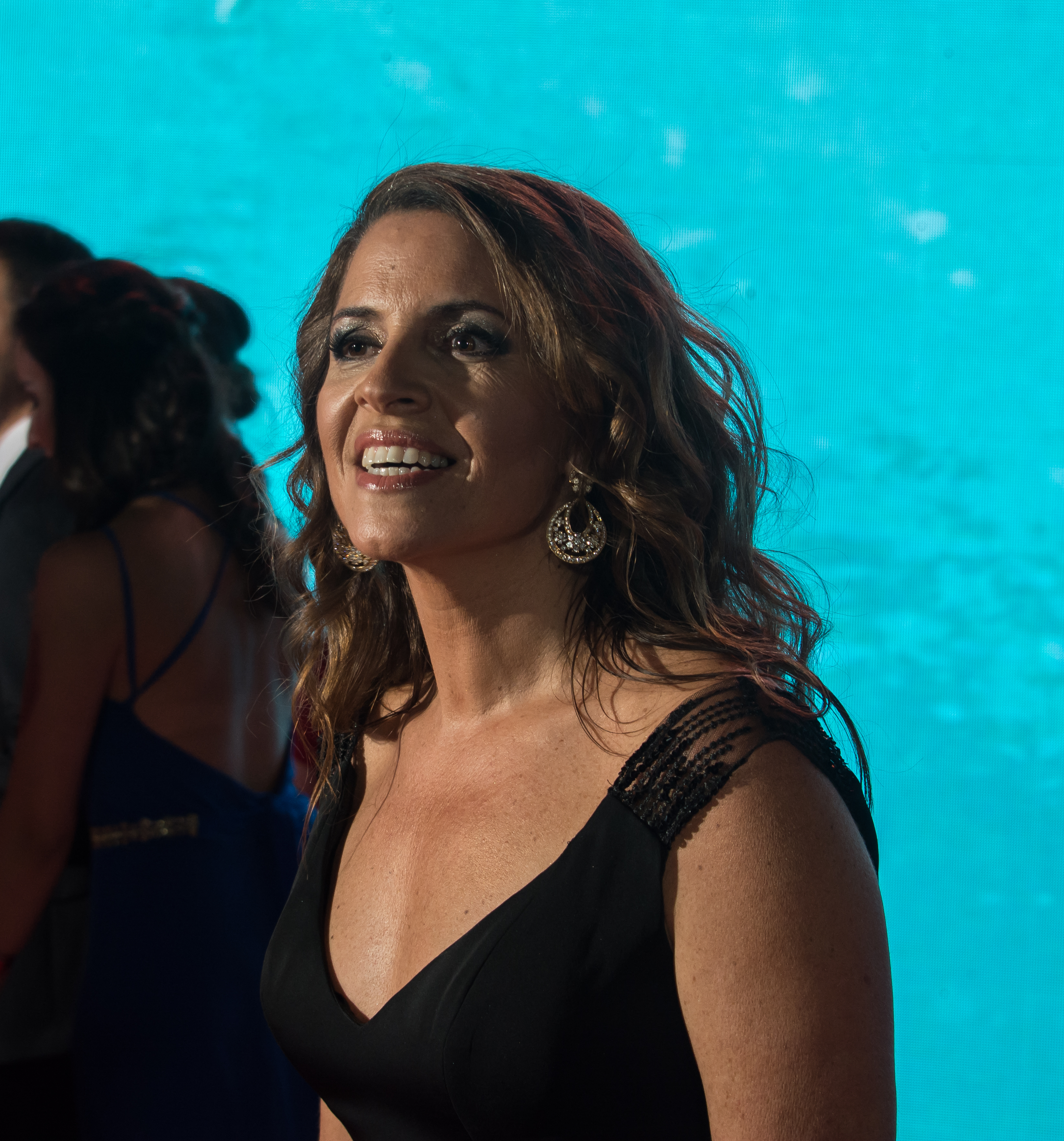 Monserrat Álvarez, Copihue de Oro 2018, Sun Monticello, Mostazal, Región de O'Higgins, Chile